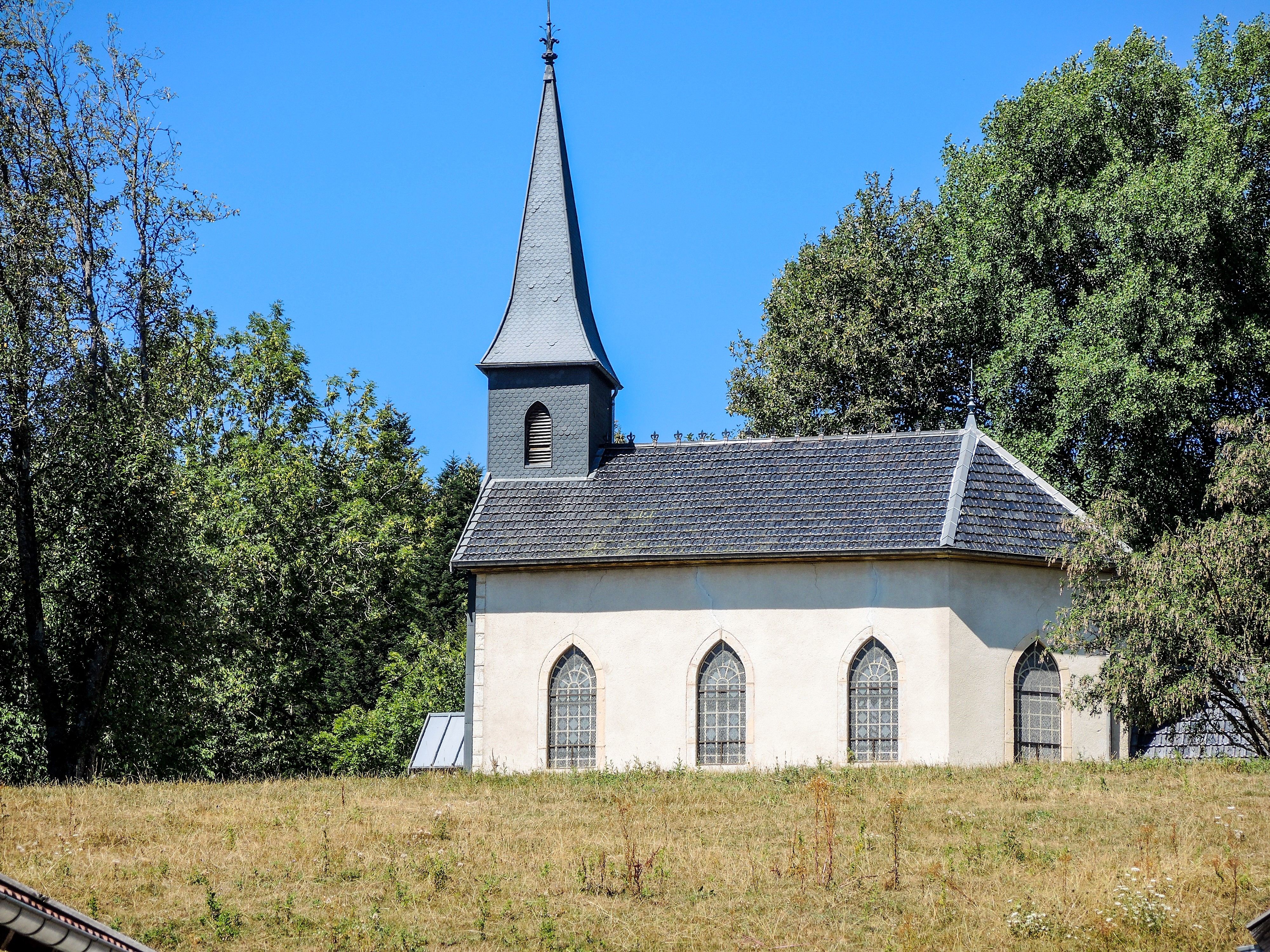 Chapelle Sainte-Anne. Les Fontenelles. Doubs